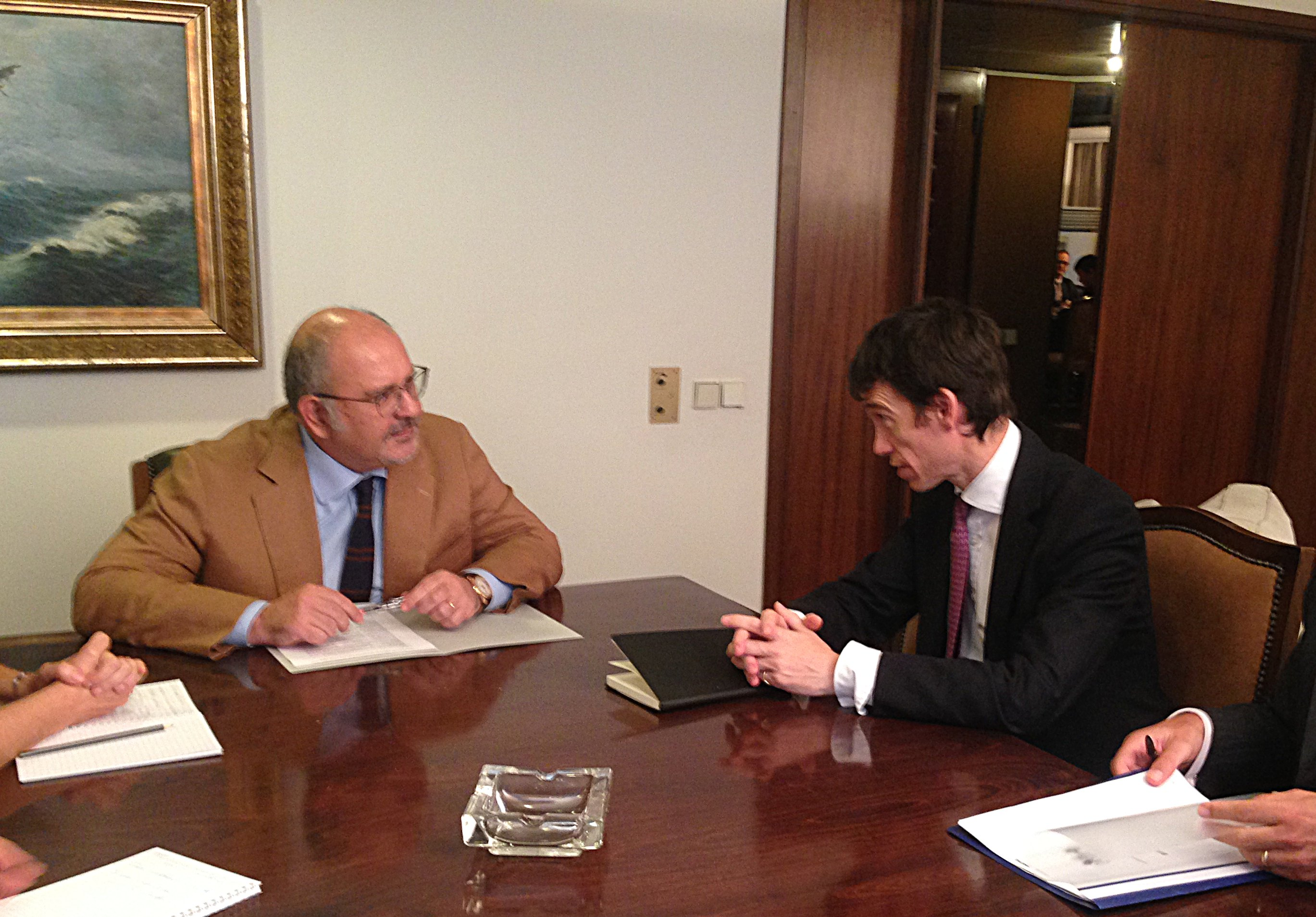 Ο Αναπληρωτής Υπουργός Εξωτερικών, κ. Νίκος Ξυδάκης, συναντήθηκε την 22/9/2016 στο Υπουργείο Εξωτερικών σε ιδιαίτερα φιλικό κλίμα με τον Βρετανό Υπουργό Επικρατείας για τη Διεθνή Αναπτυξιακή Συνεργασία, κ. Rory Stewart.